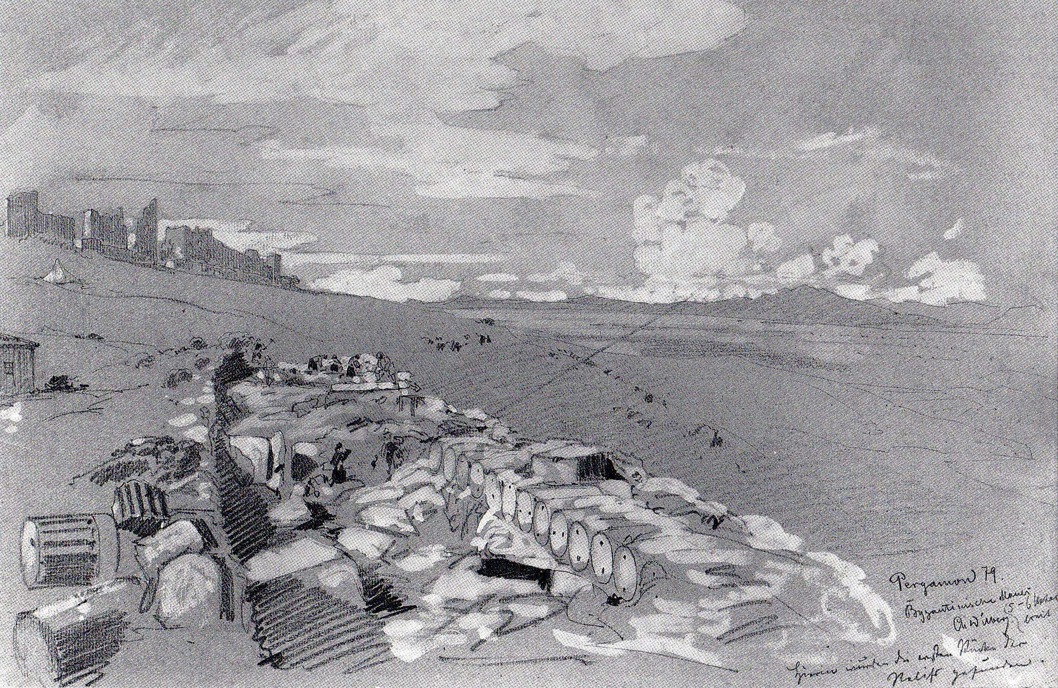 Christian Wilberg: Ausgrabungen an der byzantinischen Mauer; Bleistiftzeichung, weiß gehöht; 29,8x46,7cm; Beschriftung: "Byzantinische Mauer. 5-6 Meter breit. Hierin wurden die ersten Stücke der Reliefs gefunden. Pergamon 79"; Staatliche Museen zu Berlin, Kupferstichkabinett, Sammlungen der Zeichnungen und Druckgrafiken